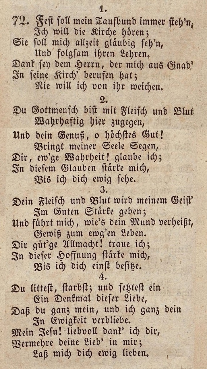 Christoph Bernhard Verspoell: Fest soll mein Taufbund immer stehn, Druckfassung 1829